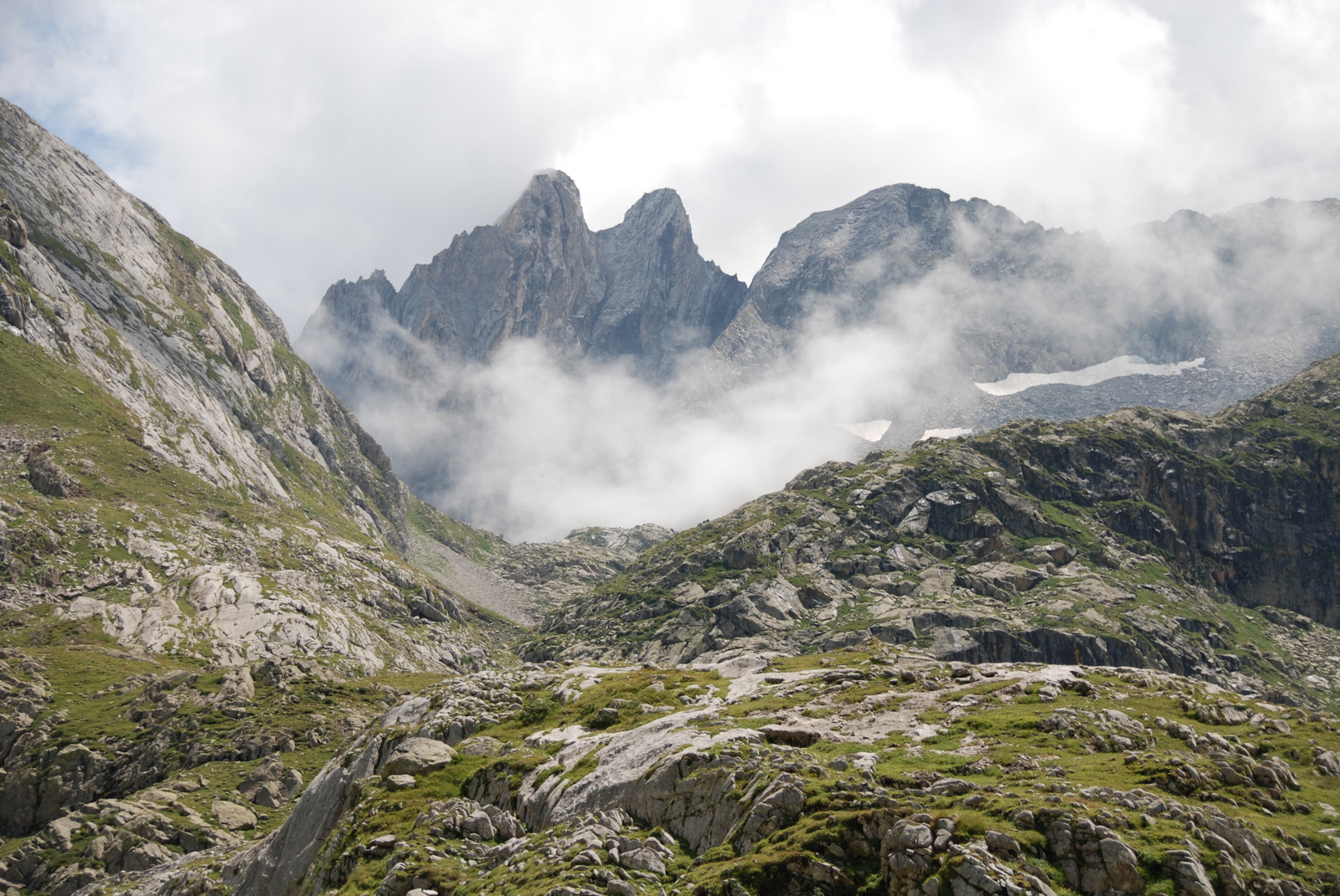 El Forcanada (2881m y 2872m) desde el ibón de Coll de Toro.